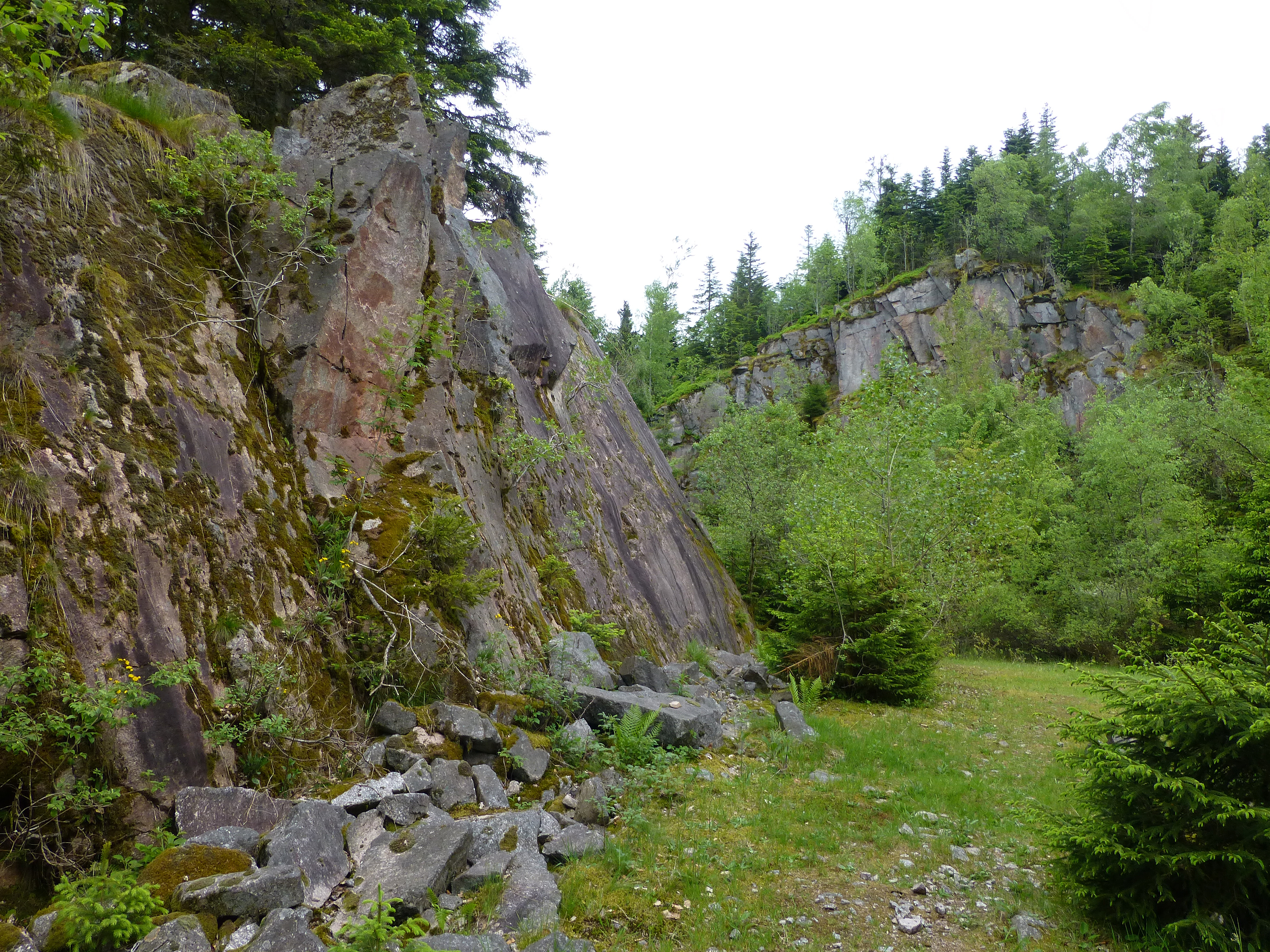 Barbey-Seroux (Vosges) : carrière de granite des Tronces